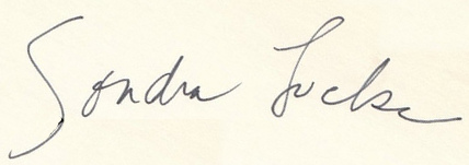 Sondra Locke's signature autograph